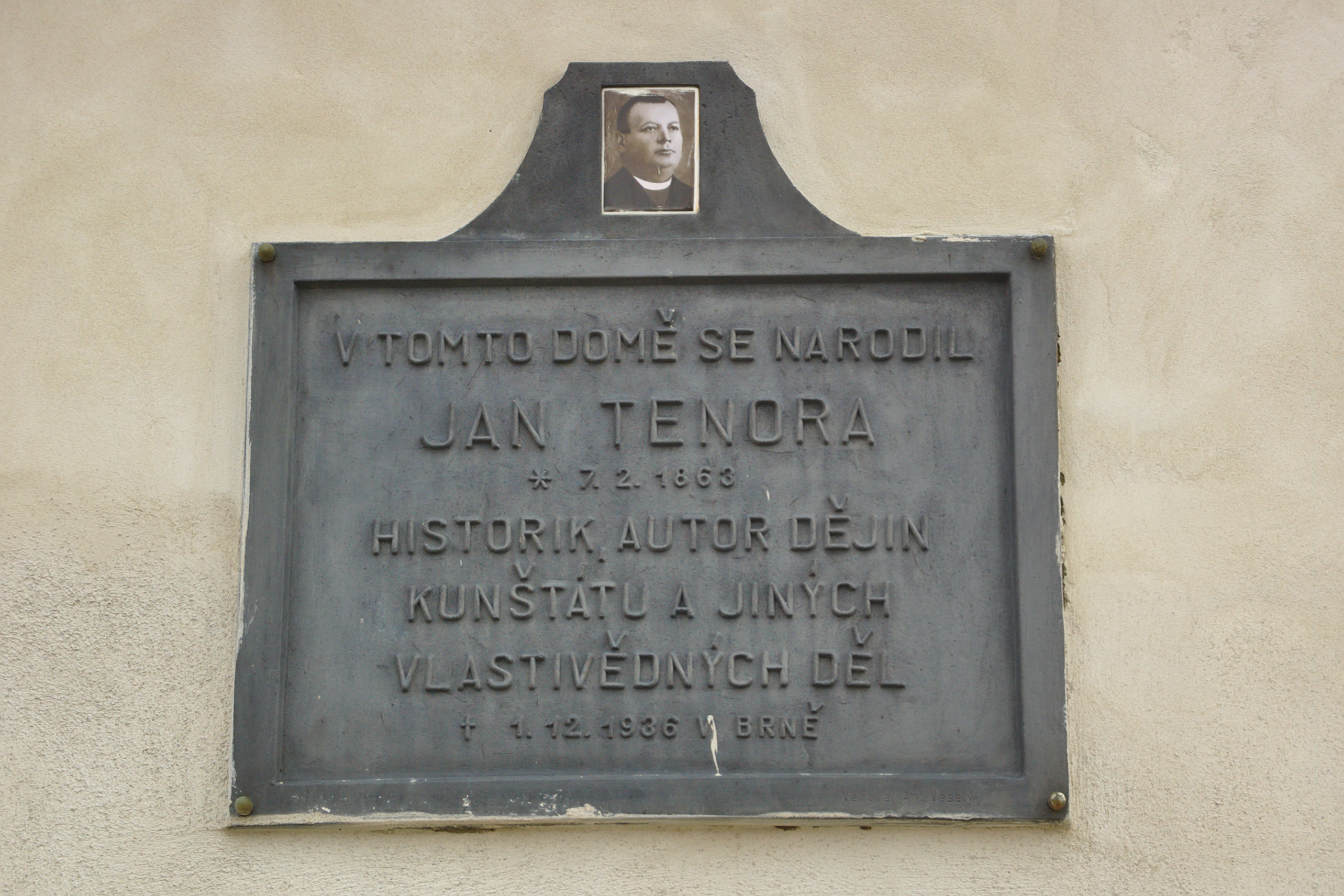 Pamětní deska - Jan Tenora, náměstí Krále Jiřího, Kunštát, okres Blansko